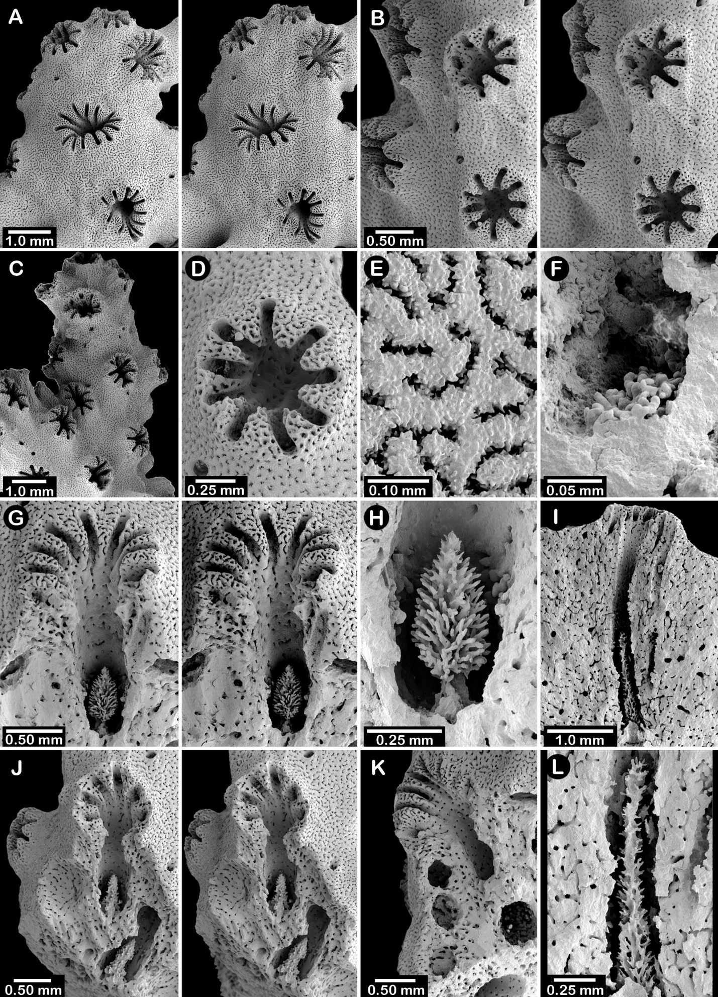 Stylaster brochi. A vista estéreo de ciclosistemas en la punta de una rama B vista estéreo de ciclosistemas y dactiloporos C punta de rama D ciclosistema E textura del coenosteum F dactliostilo G vista estéreo de sección longitudinal de ciclosistema H un gastrostilo rodeado por su anillo de empalizada I, L un gastrostilo alargado J sección longitudinal de ciclosistema mostrando curvatura del tubo del gastroporo, ampulla hembra seccionada, y dos gastrostilos K sección transversal de varias ampulla macho y un tubo de gastroporo. Cairns S, Lindner A (2011) A Revision of the Stylasteridae (Cnidaria, Hydrozoa, Filifera) from Alaska and Adjacent Waters. ZooKeys 158: 1-88.